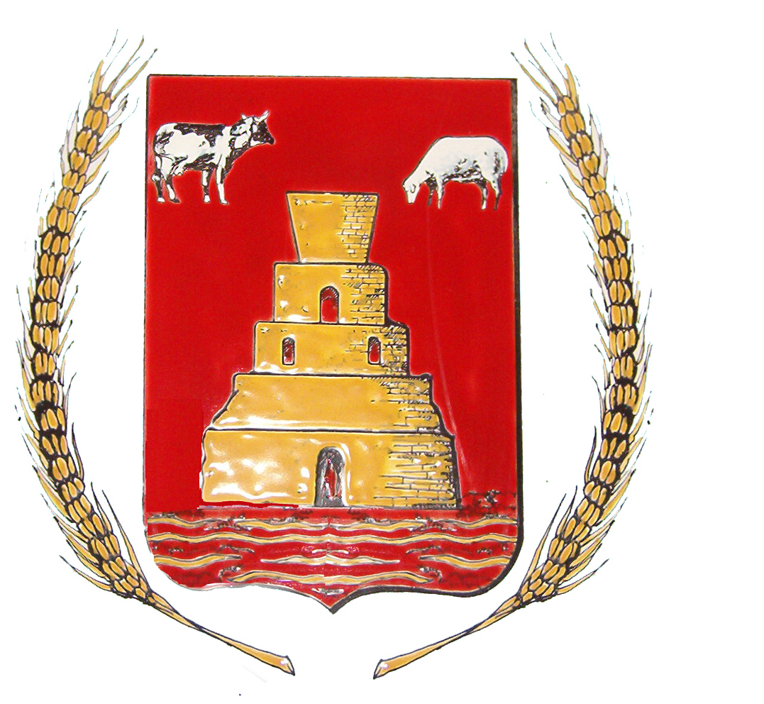 escudo del municipio